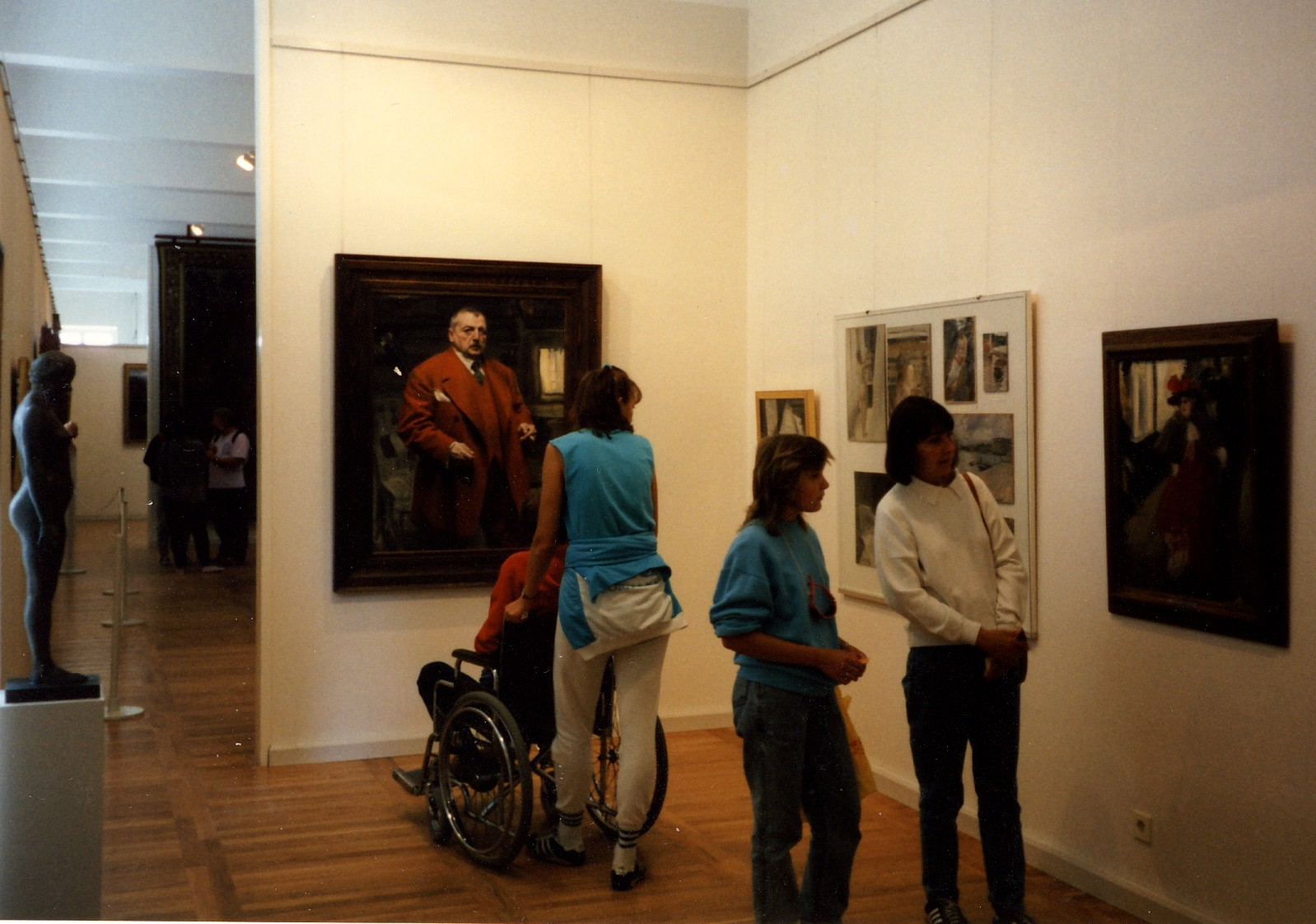 Zornmuseet, Zornsamlingarna i Mora